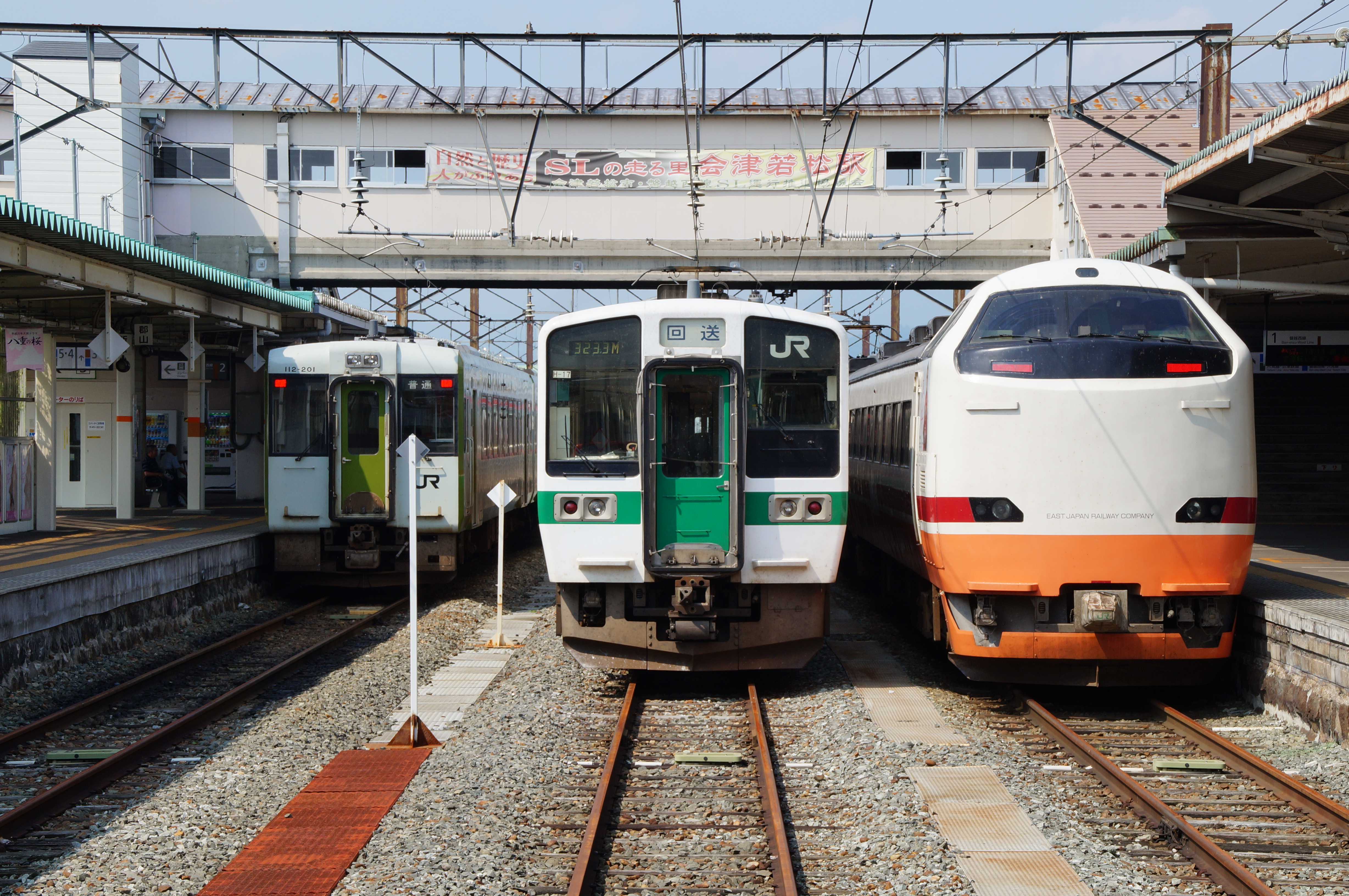 駅構内1・2番線